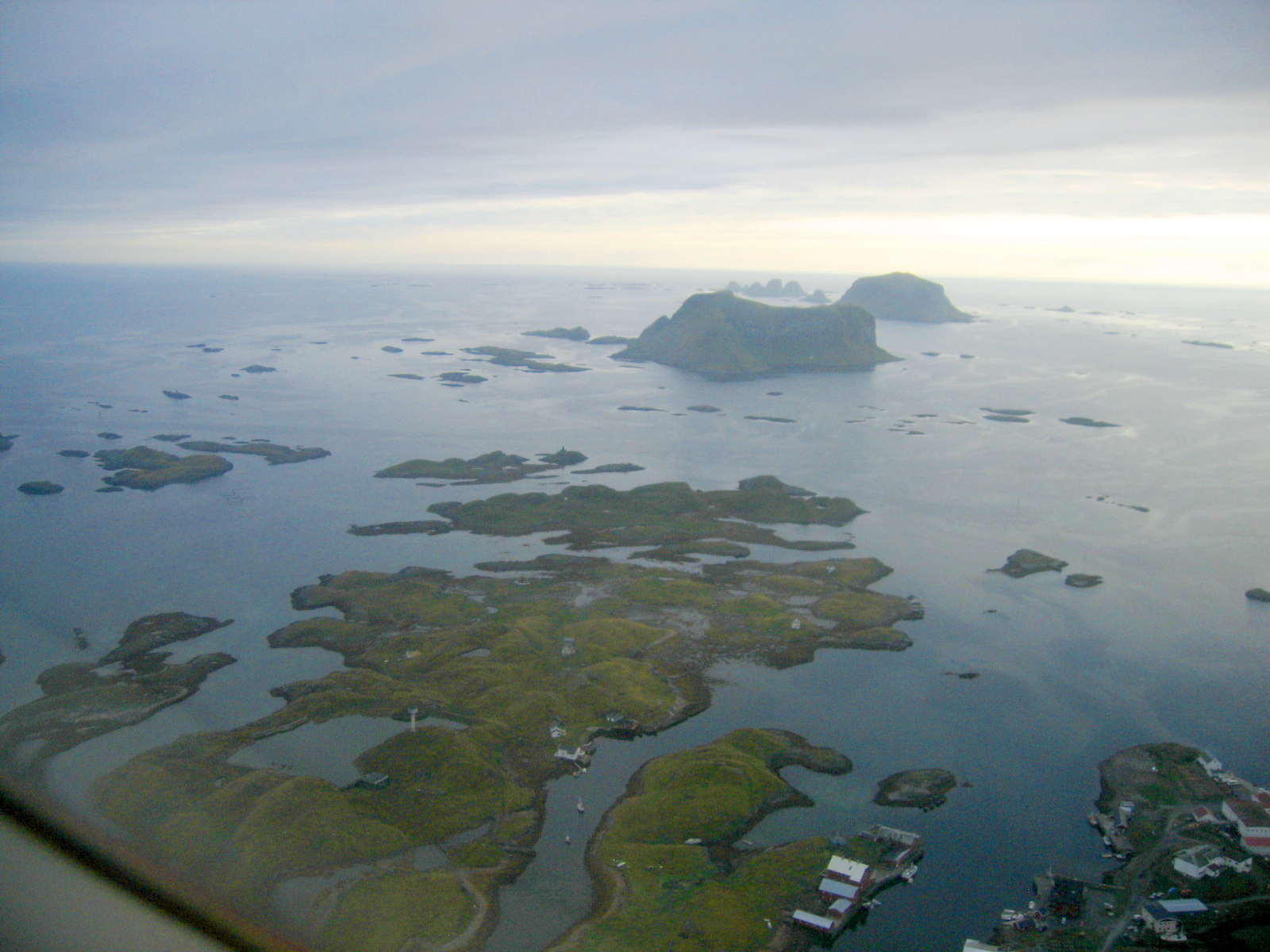 Røst. øy utenfor Lofoten.